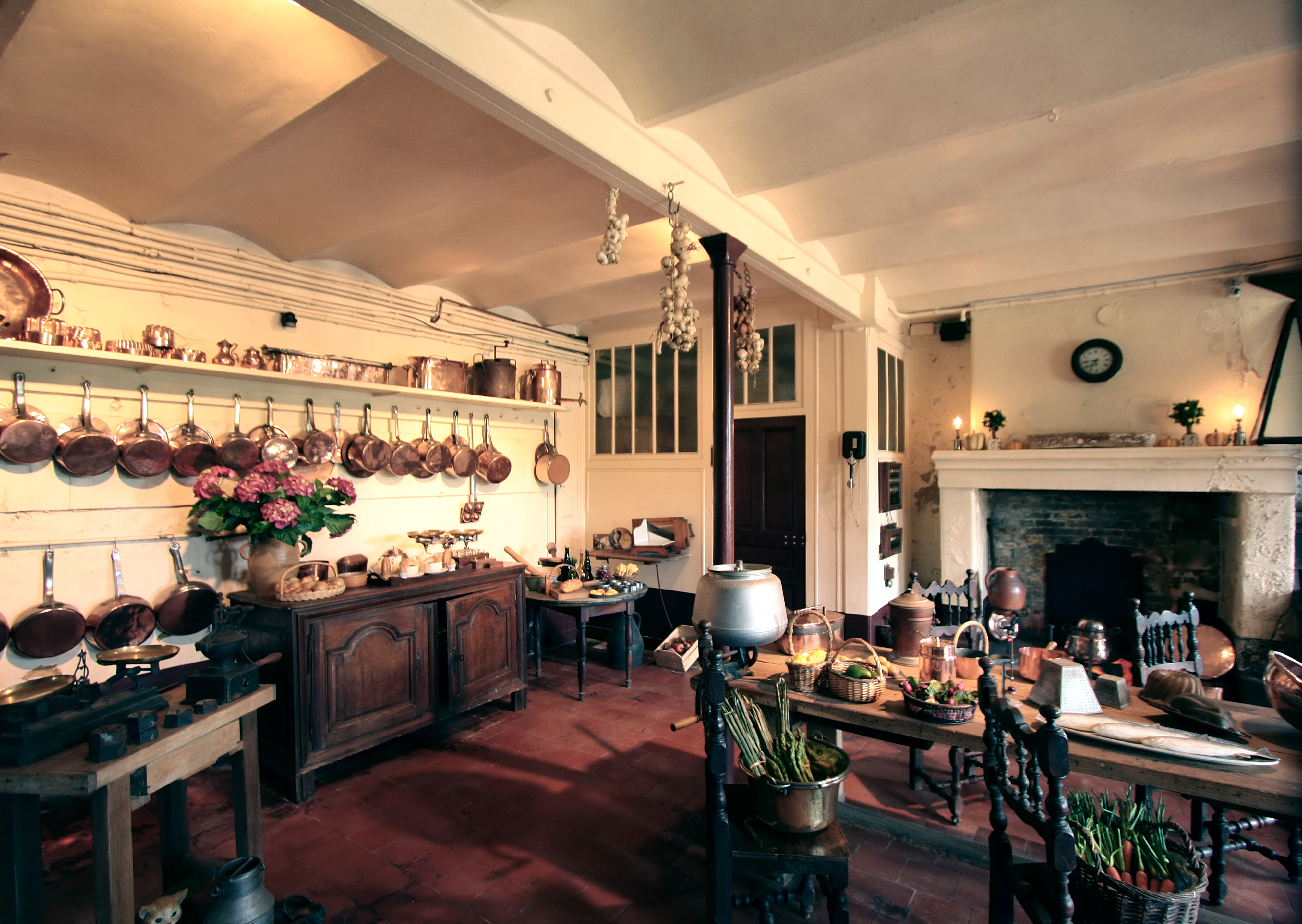 Schloss Montpoupon im Département Indre-et-Loire/Frankreich - Alte Küche.